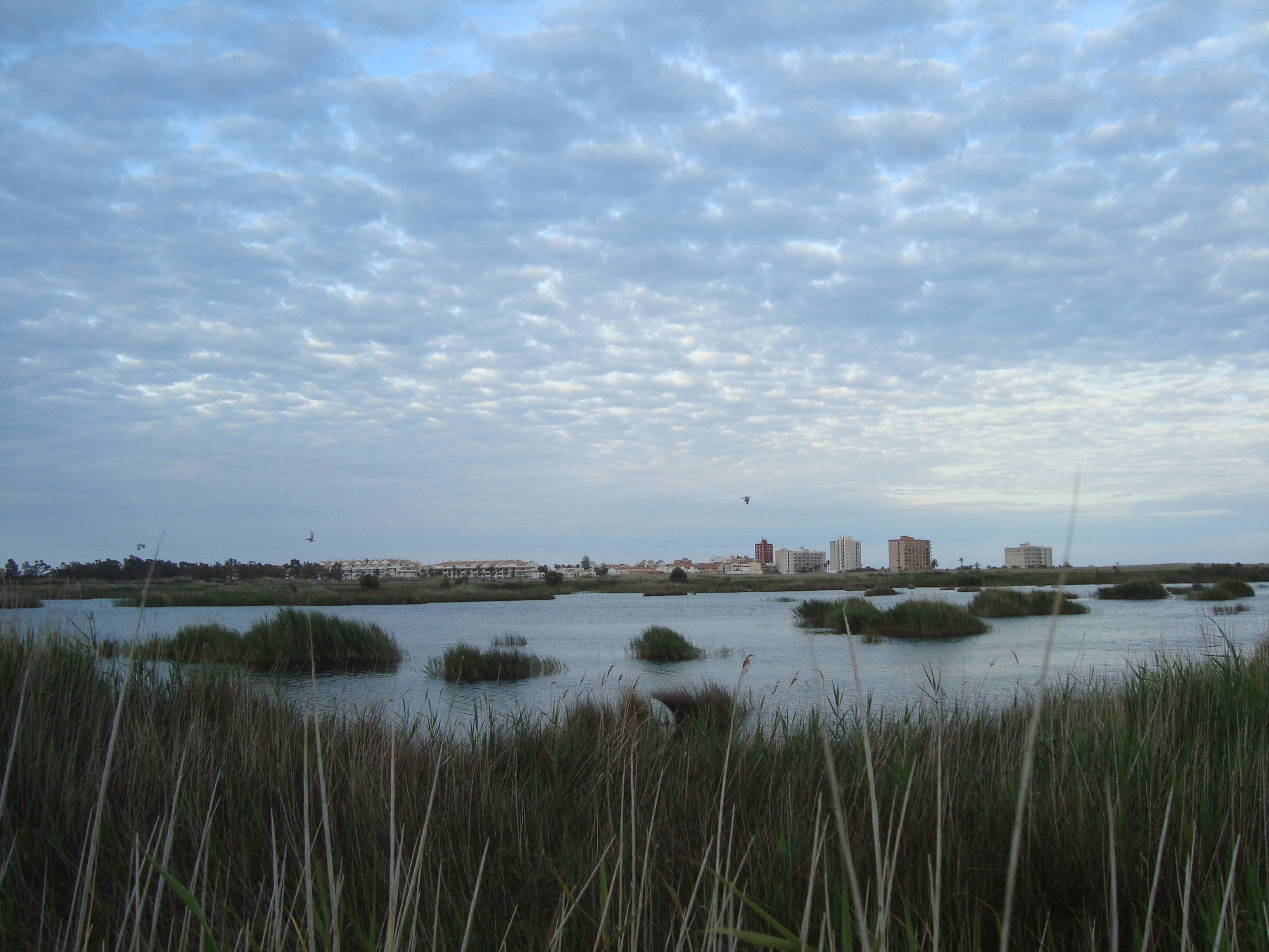 Parc Natural, Torreblanca This is a photography of a Special Area of Conservation in Spain with the ID: ES0000060. Natura2000 entry, EEA entry